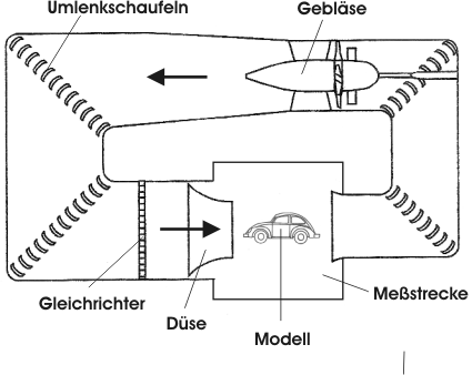 Zeichnung eines geschlossenen Windkanals (Göttinger Bauart) für den subsonischen Geschwindigkeitsbereich